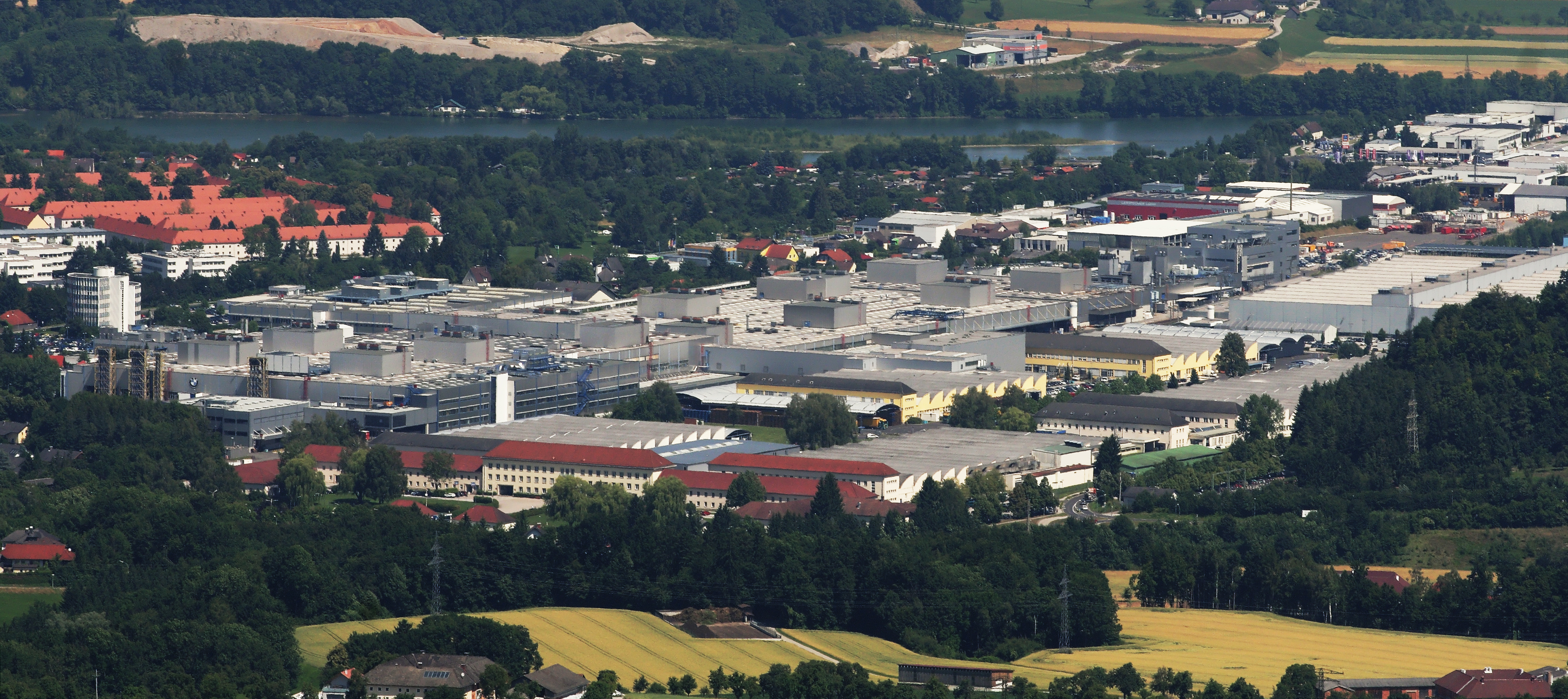 Blick von der Dambergwarte in Sankt Ulrich auf das BMW-Werk und das SKF-Wälzlagerwerk in Steyr.